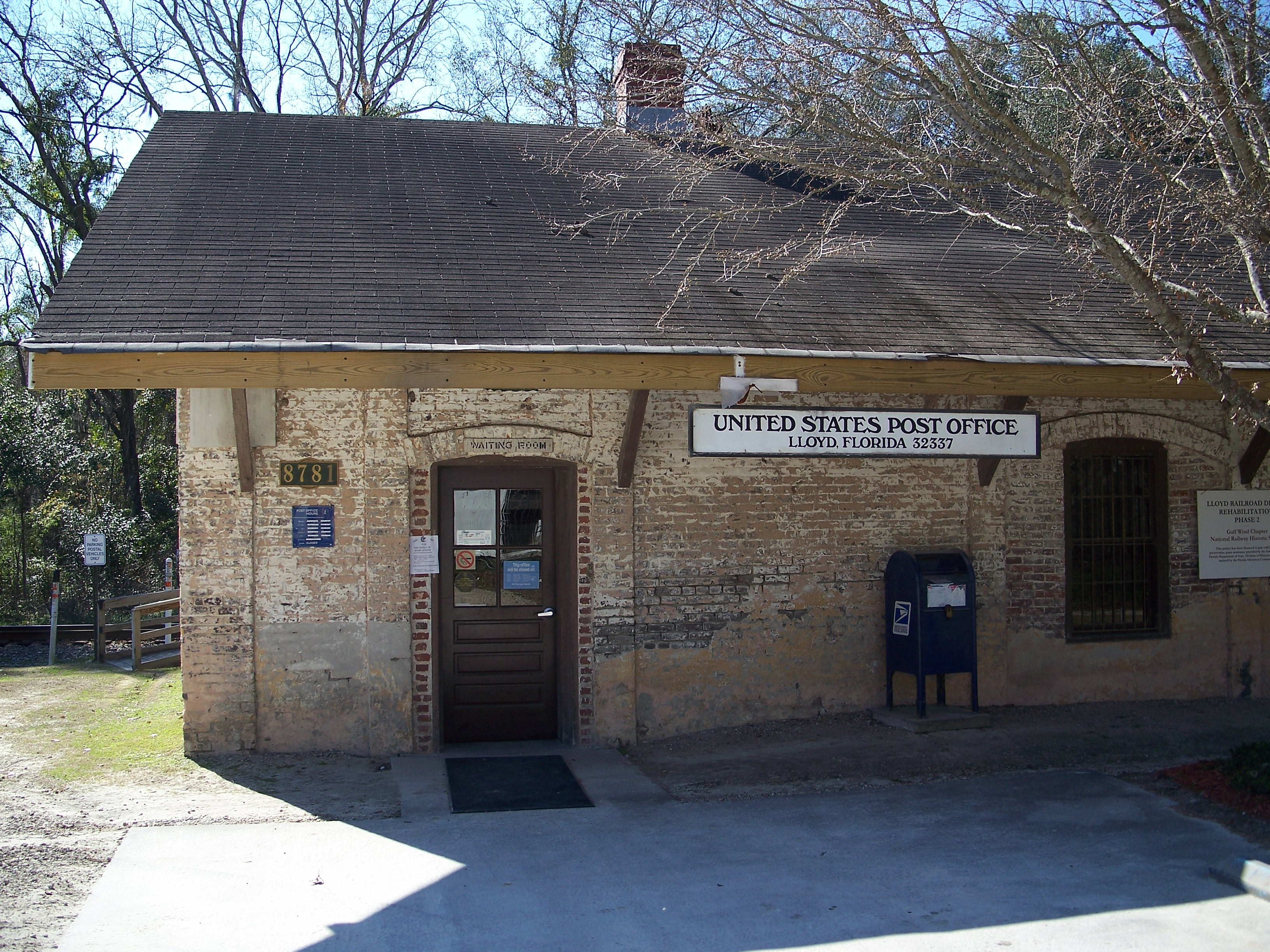 Lloyd Railroad Depot, in Lloyd, Florida